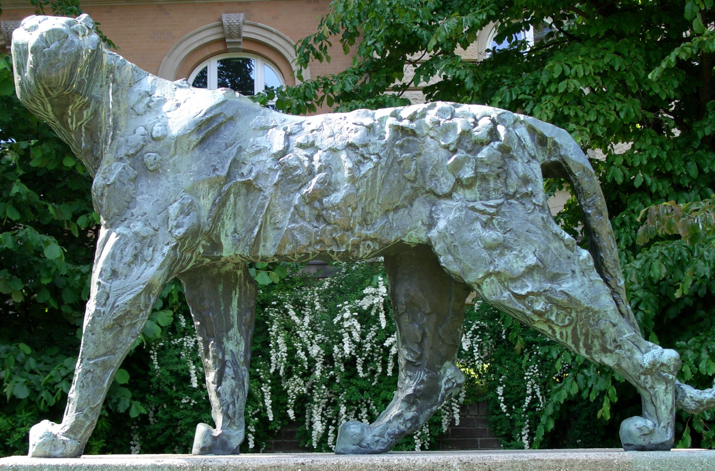 Skulptur eines Panthers von Hans Martin Ruwoldt in Hamburg/Germany Standort: Hamburger Park „Planten un Blomen“. Aufnahmedatum: 16. Juni 2005 Habe ich selbst aufgenommen.